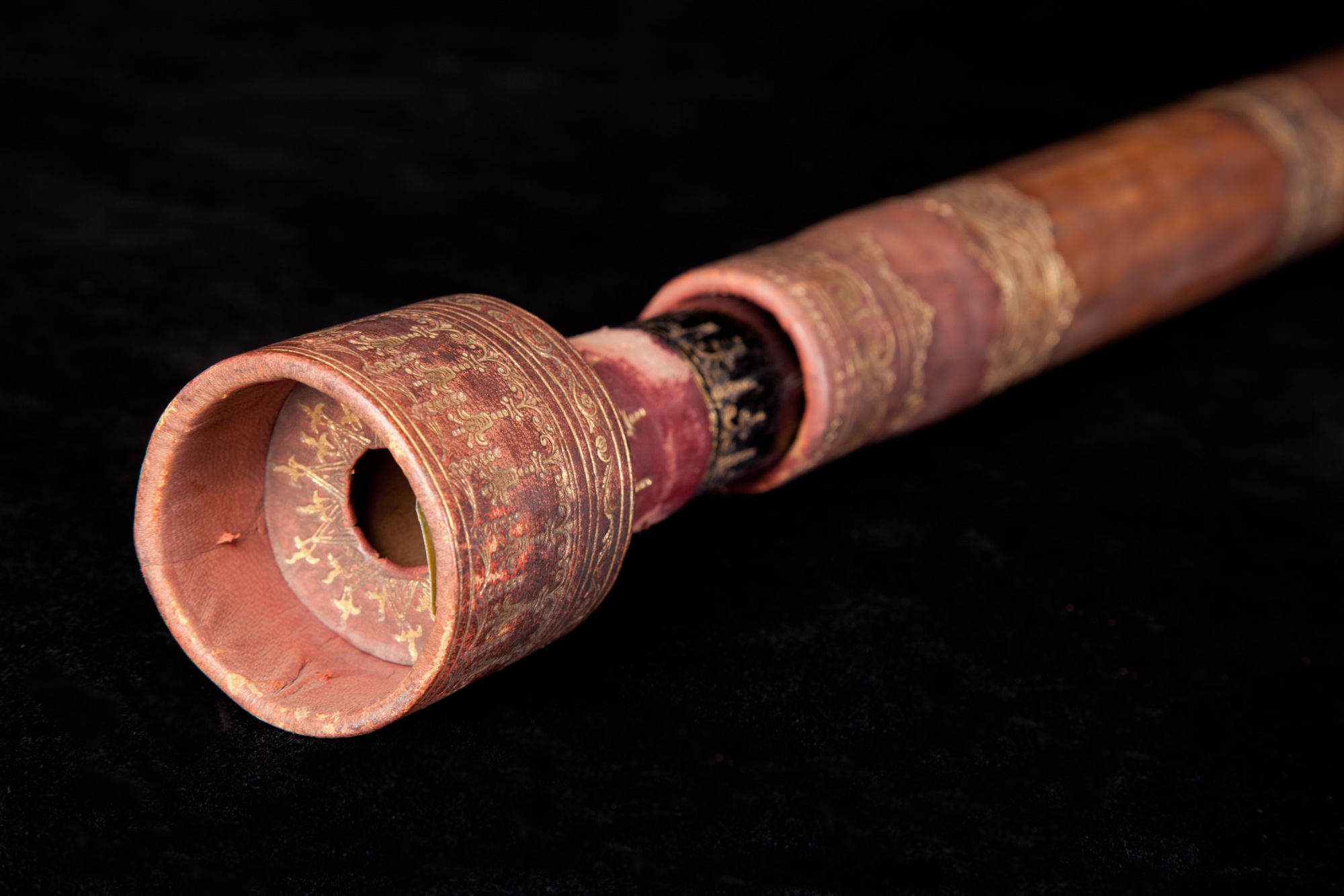 Cannocchiale galileiano, riproduzione di uno dei cannocchiali di Galileo, sec. XX. Museo nazionale della scienza e della tecnologia Leonardo da Vinci, Milano.